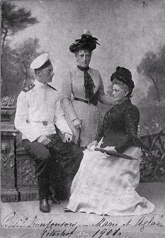 Графиня Аглаида Васильевна Голенищева-Кутузова (в центре) (1853—1920) с сестрой Марией (1851—1915) и племянником Василием Александровичем Голенищевым-Кутузовым (1882—1903).